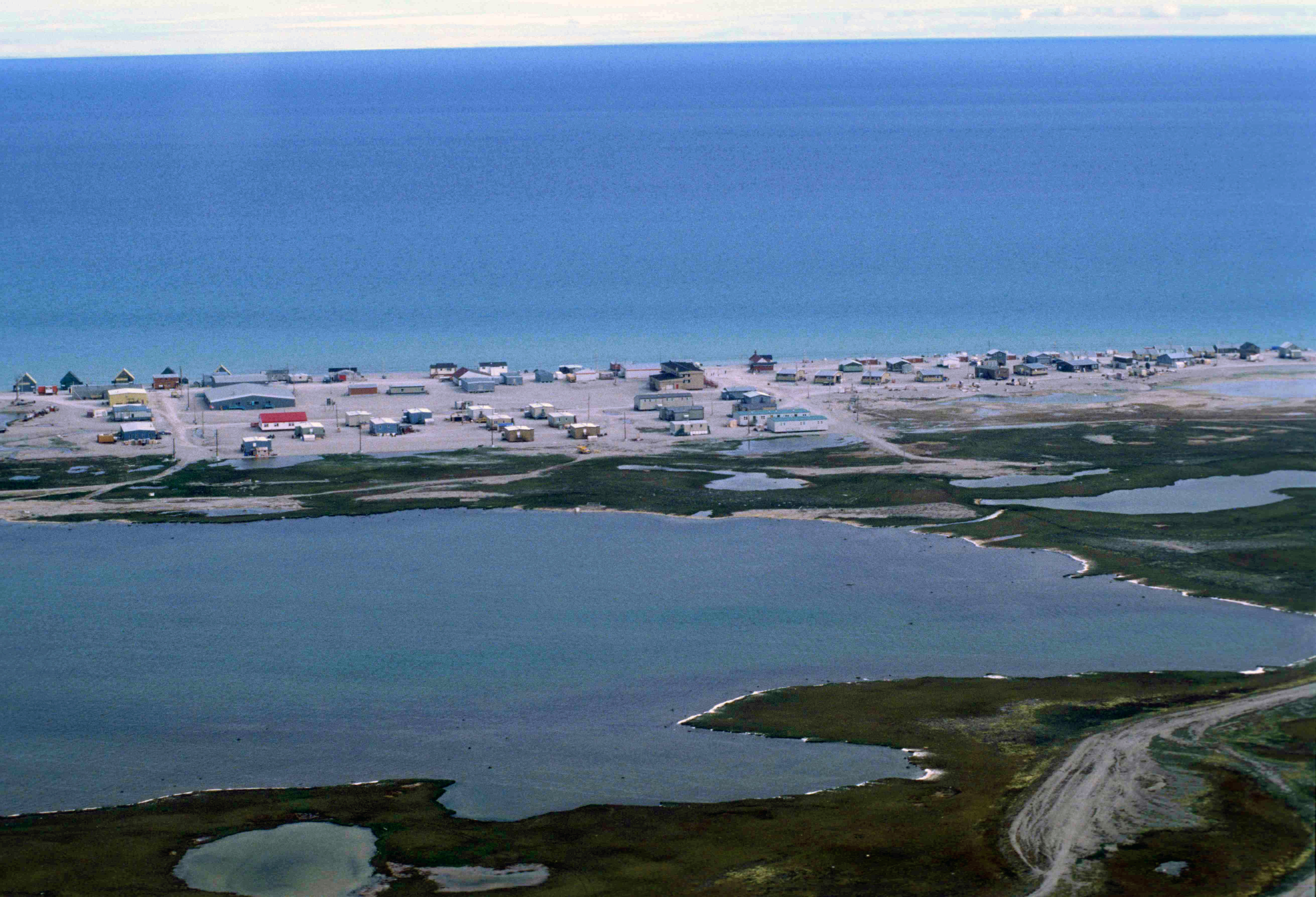 Hall Beach